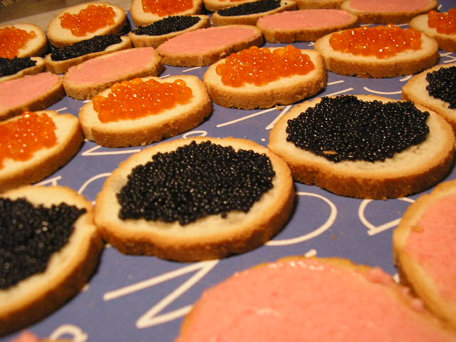 Salmon eggs & tarama